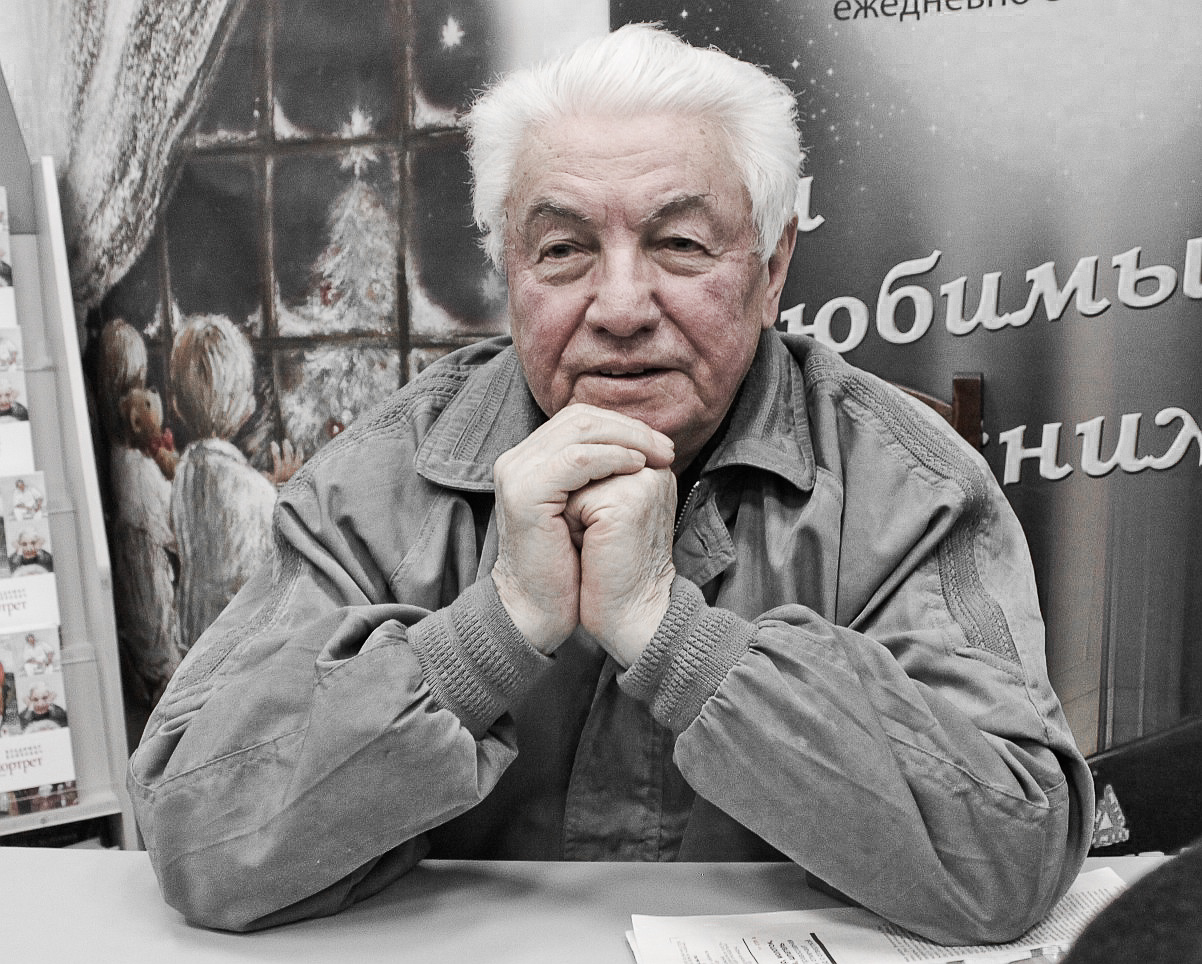 Владимир Войнович